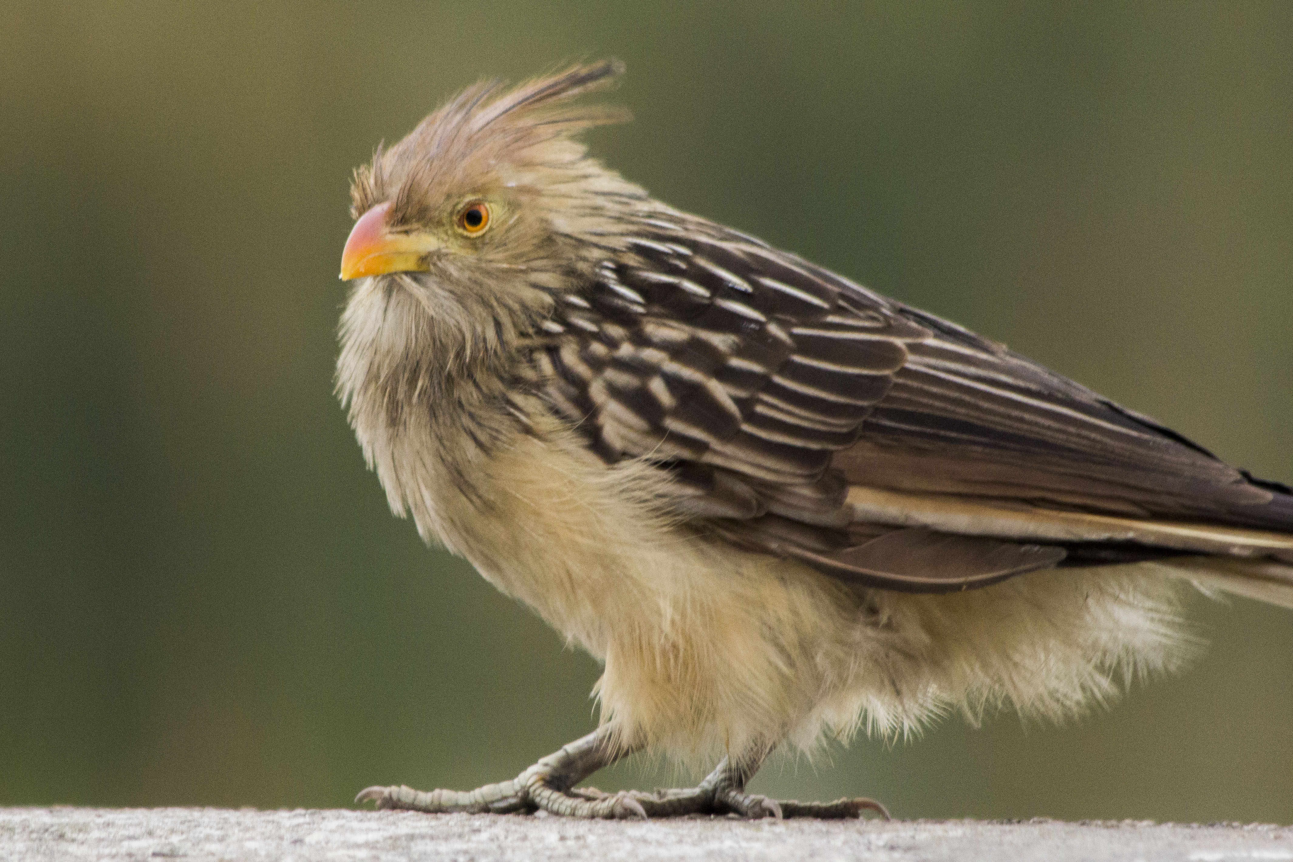 Pirincho en la Reserva Ecológica de Buenos Aires 2